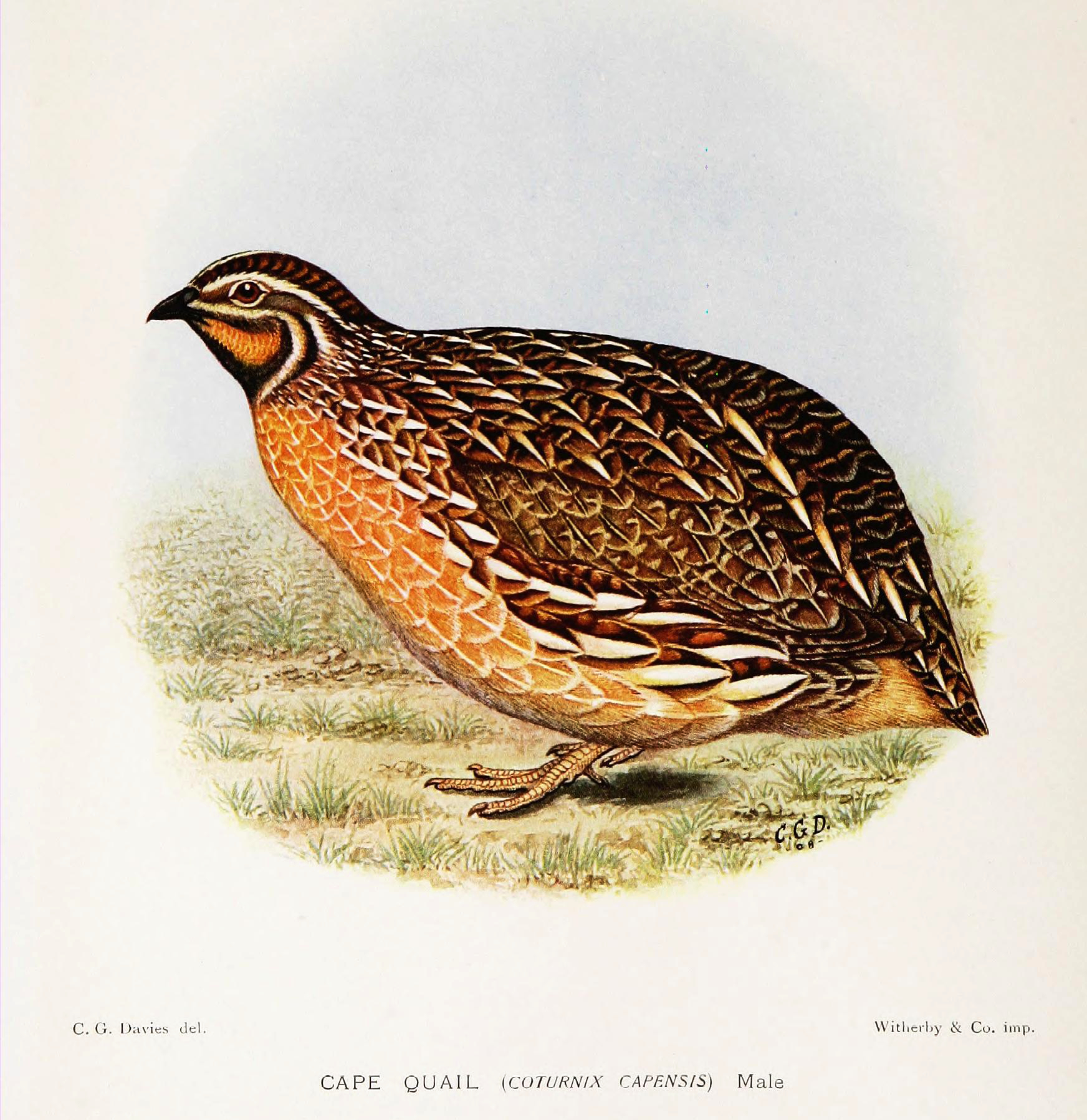 Coturnix coturnix capensis